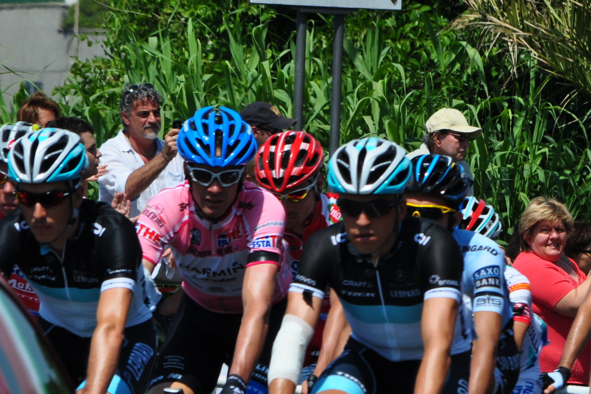 David Millar in maglia Rosa durante la partenza della 4a tappa del Giro d'Italia 2011 (Genova/Quarto dei Mille-Livorno)